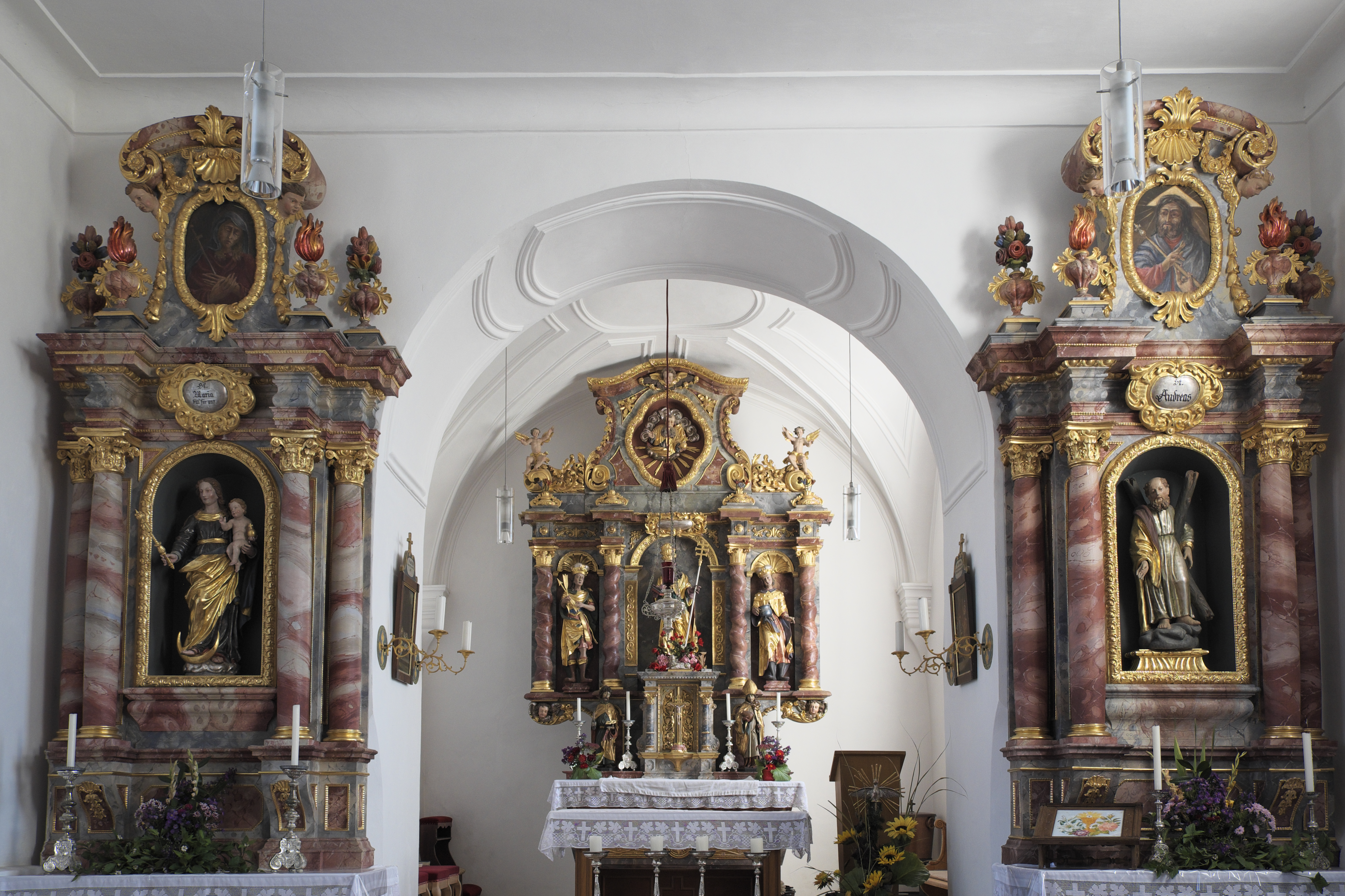 Katholische Filialkirche St. Urban in Palsweis (Bergkirchen) im Landkreis Dachau (Bayern/Deutschland), Innenraum